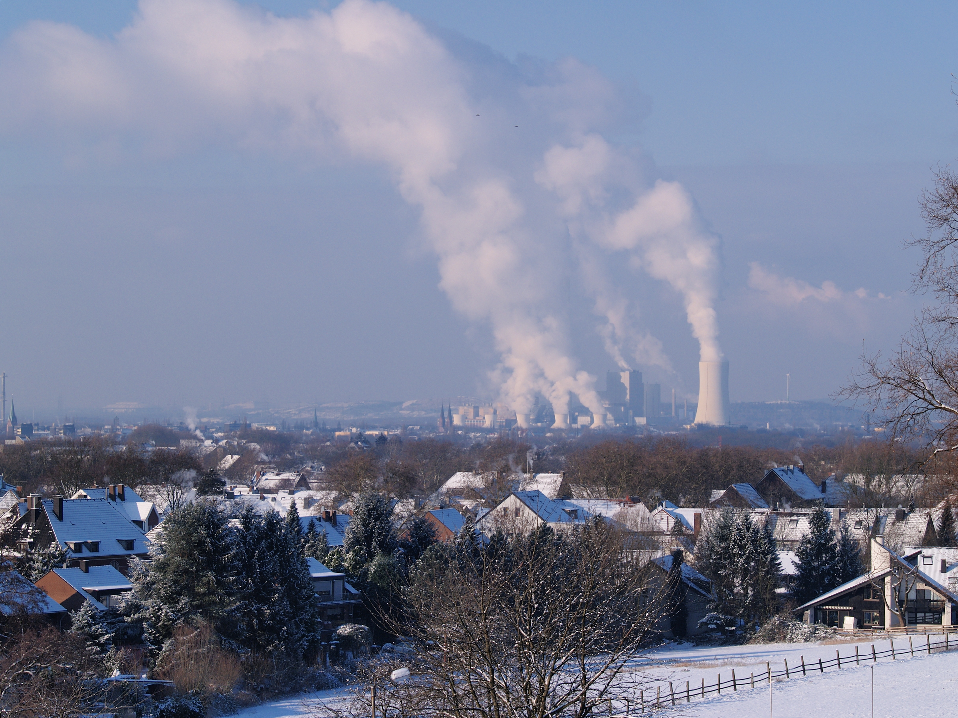 Evonik-Steinkohlenkraftwerk in Herne Baukau, Blick über das Emschertal nach Westnordwest mit den Herner Stadtteilen Sodingen und Baukau